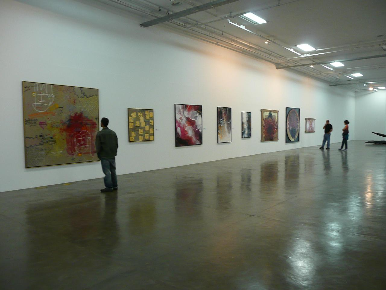 Parque Ibirapuera - MAC - Street Art expo